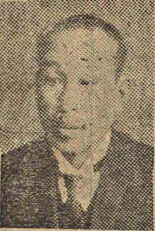 이규완, 1924년 11월